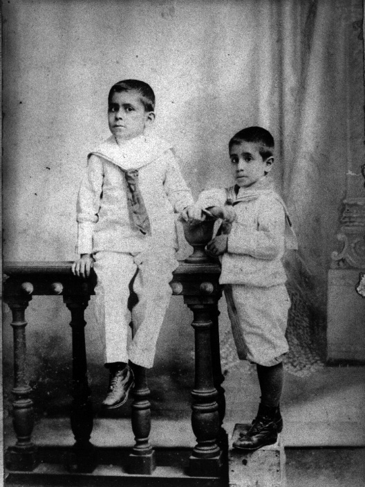 José Carlos Mariátegui, a los 10 años de edad. Al lado de su hermano Julio César. 1904. Foto Española de A. Gomez Villalobos, Lima. En el reverso manuscrito de Amalia La Chira Vda. de Mariátegui.